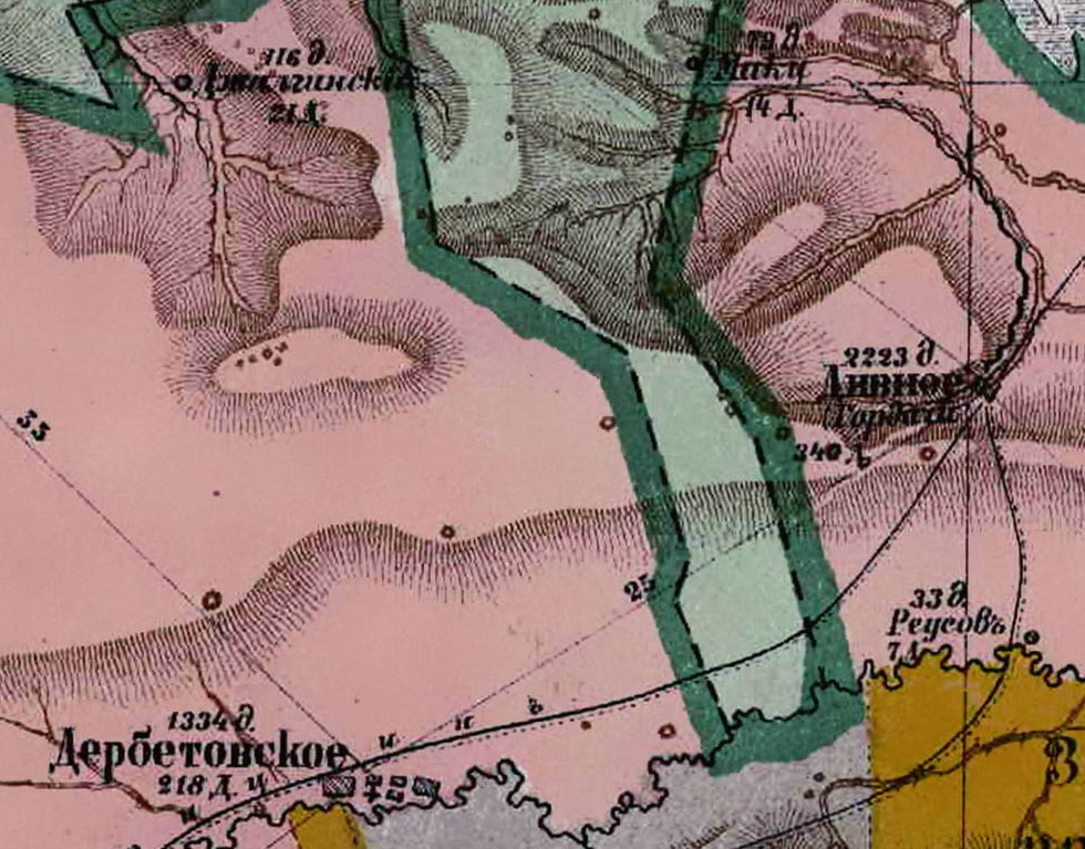 Сёла Дербетовка и Дивное на карте Ставропольской губернии 1874 года